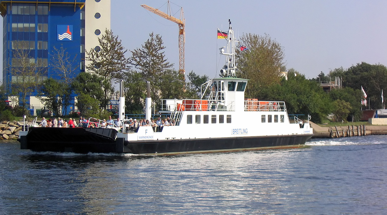 Beschreibung: Binnenfähre Breitling fährt zw. Warnemünde - Hohe Düne (Seekanal Rostock, auch "Neuer Strom" genannt) Baujahr 1994 / Oderwerft Eisenhüttenstadt Länge/Breite/Tiefgang: 38 m / 11,6 m / 0,9 m Kapazität: bis zu 25 PKWs und 150 Personen Geschwindigkeit: 7,5 Knoten Fotograf: Darkone, 5. September 2004